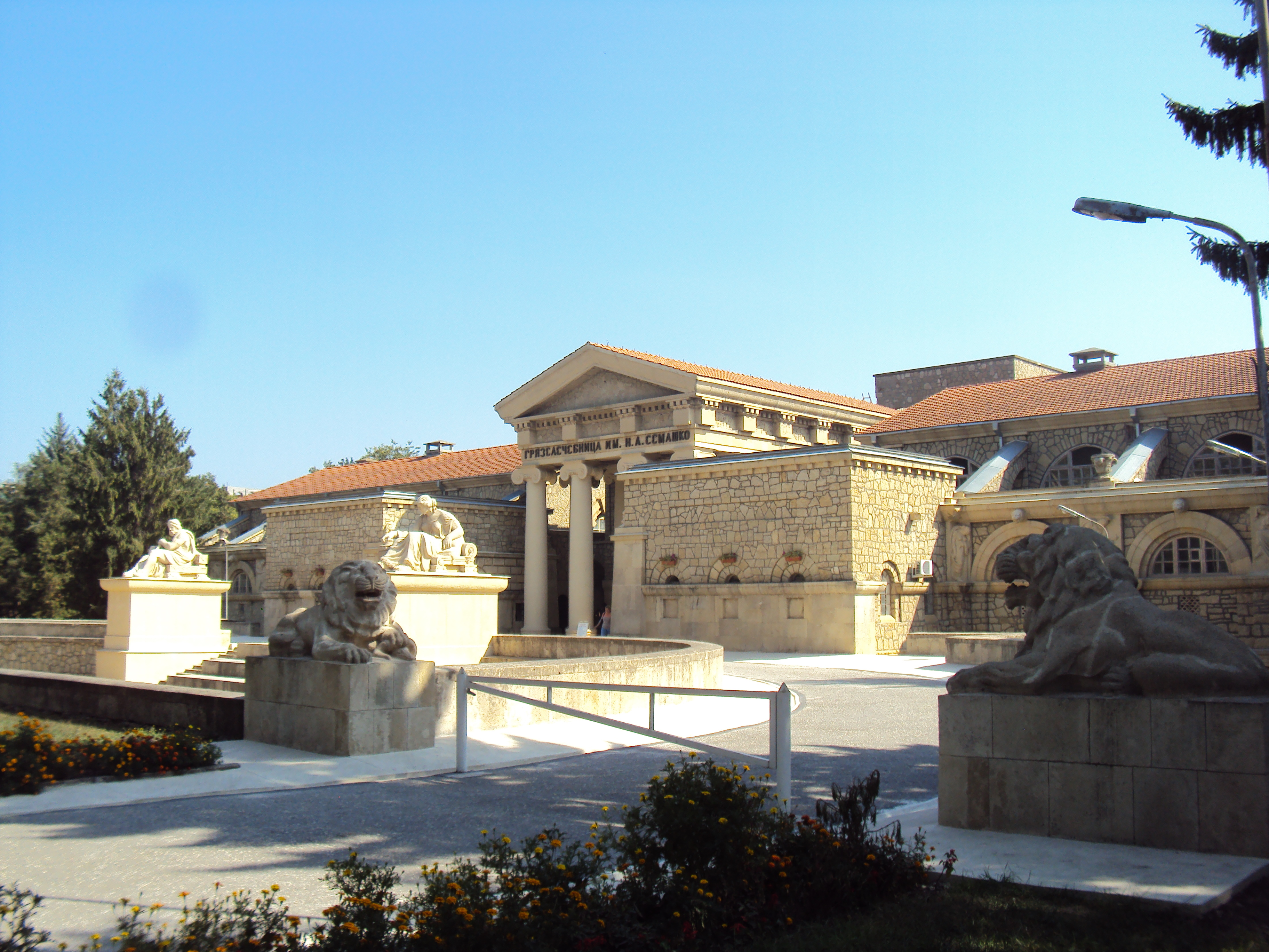 Ессентуки, грязелечебница, скульптуры львов.